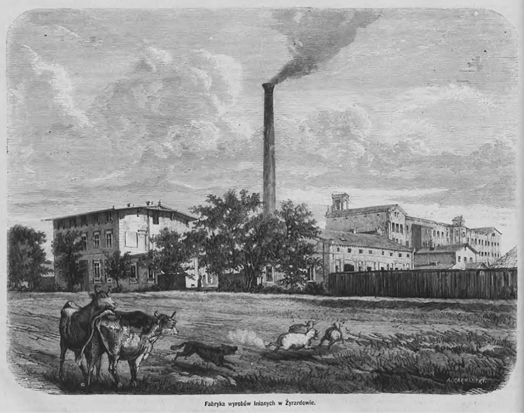 Ansicht der Leinenfabrik Żyrardów mit der Alten Spinnerei (rechts) und dem Tiroler Haus (links), aus „Tygodnik Ilustrowany“, Nr. 21/1872